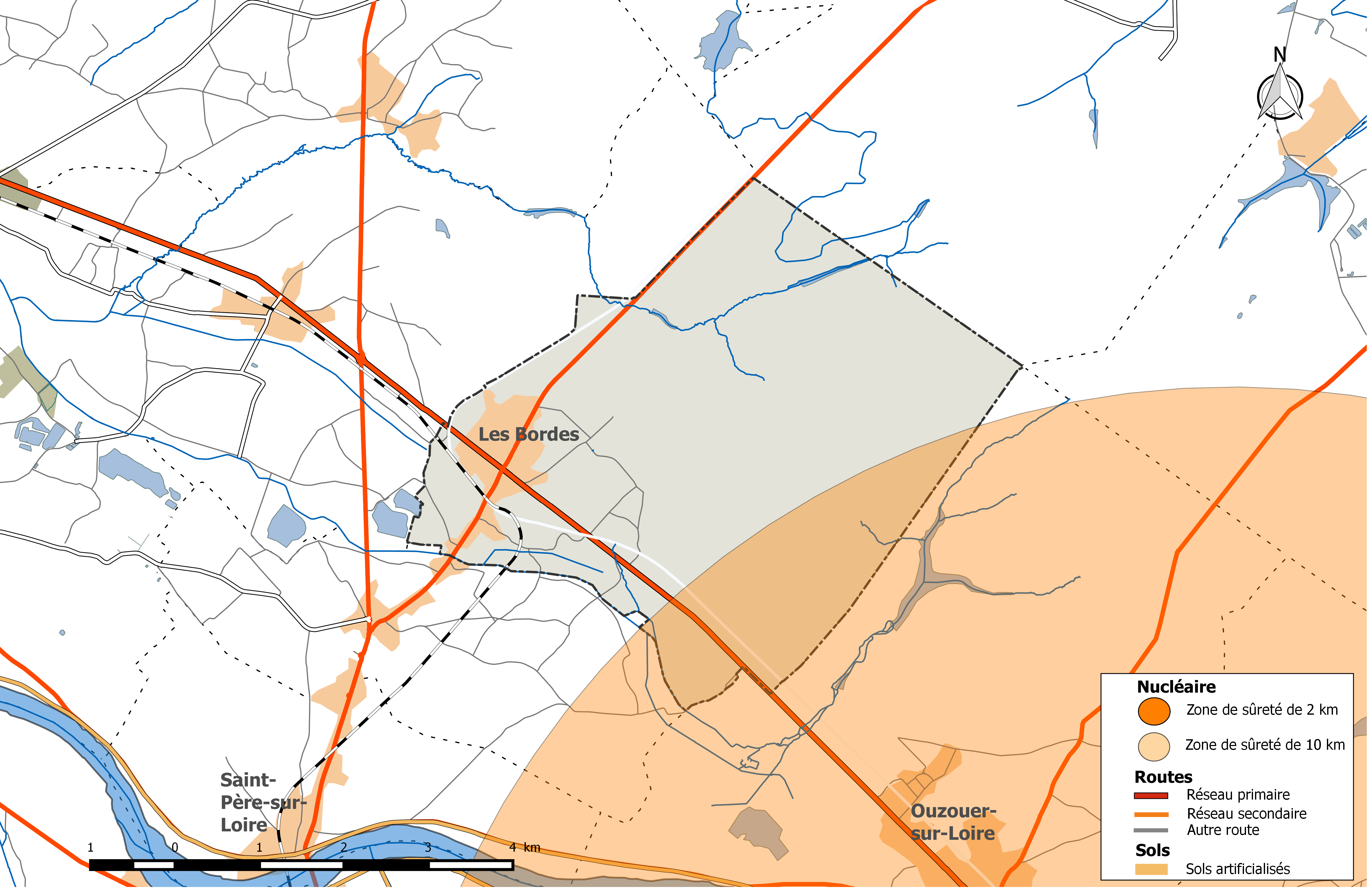 Zones de sûreté nucléaires 2 km et 10 km autour de la centrale de Dampierre - commune des Bordes